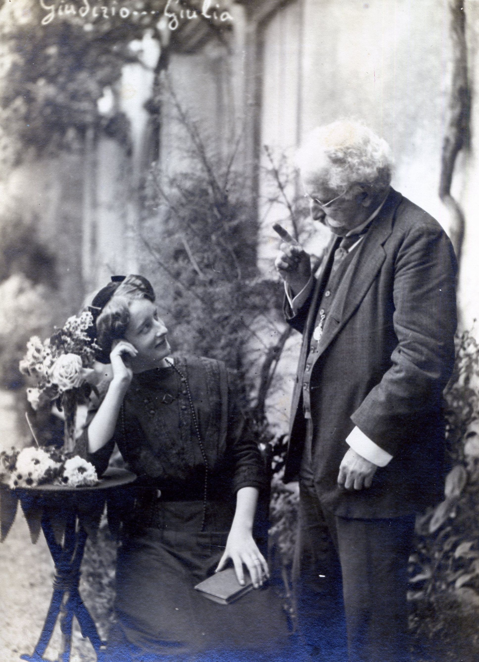 L'Ing. Enrico Bernardi dice alla cognata Giulia Concato "Giudizio......Giulia"